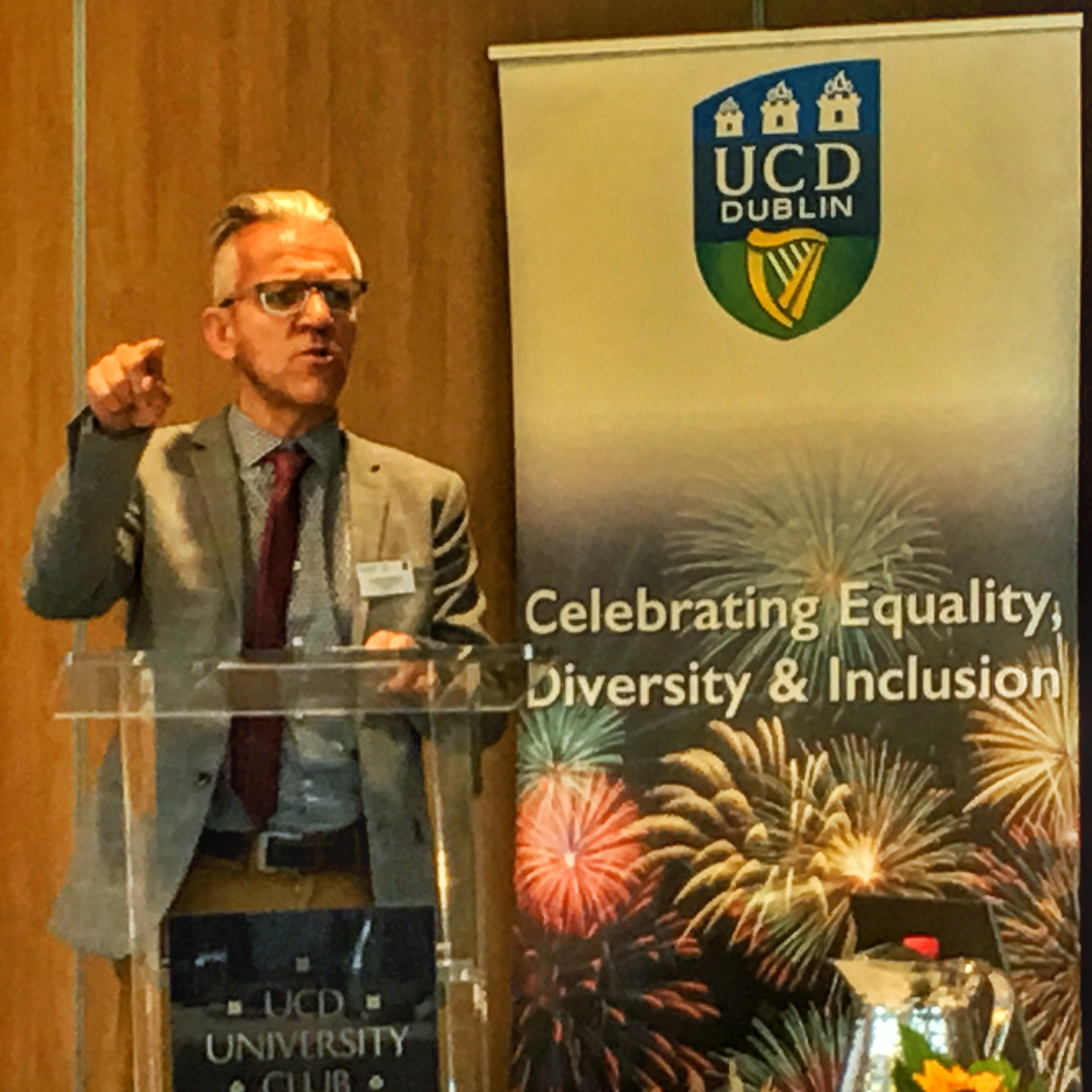 Jarosław Płuciennik (2019)